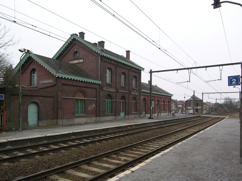 Carnières station, Belgium